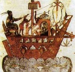 Storie di Sicilia di Fara Misuraca La Sicilia Araba: Naviganti Arabi